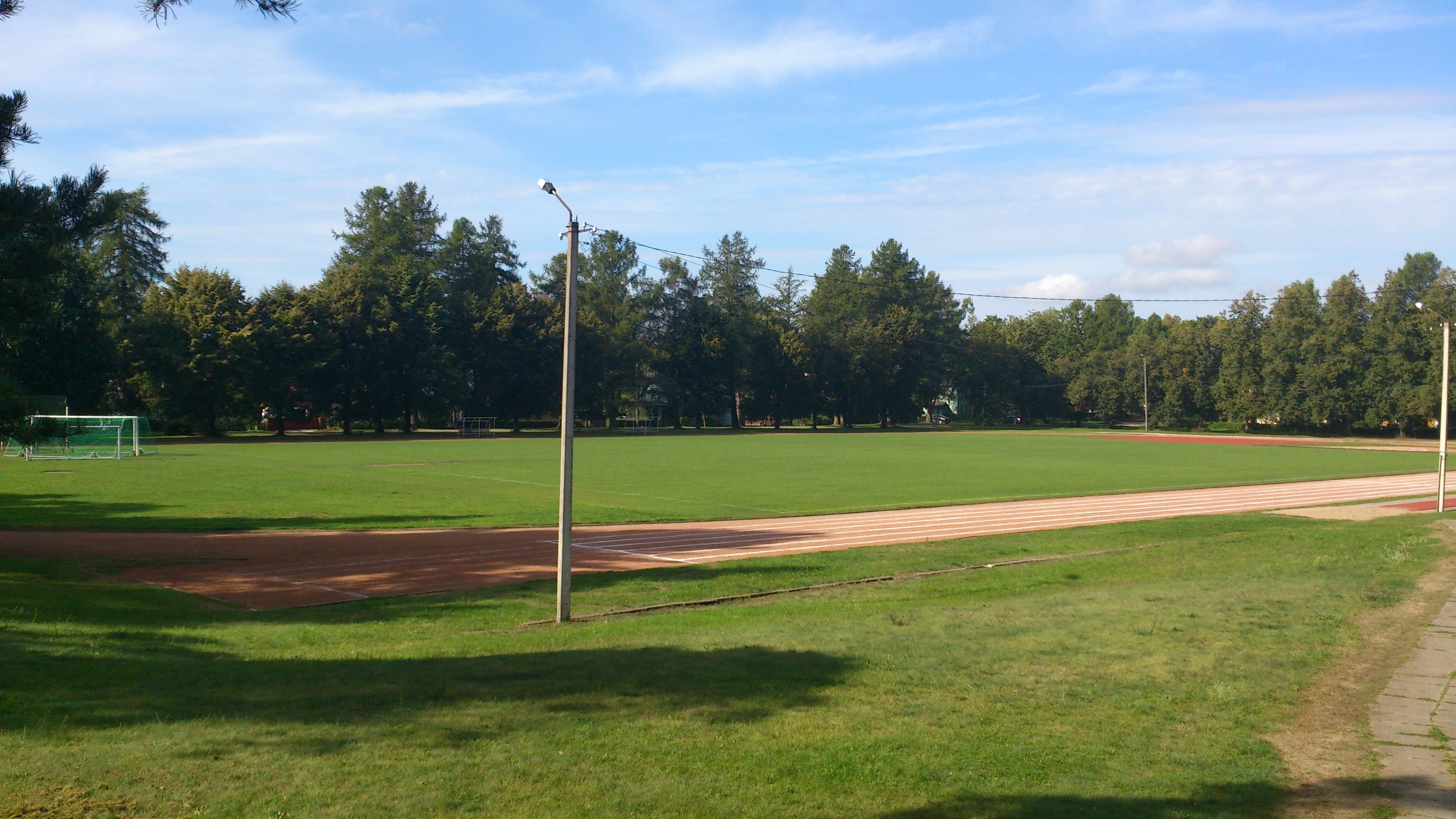 Elva linnastaadion, 31. august 2013.